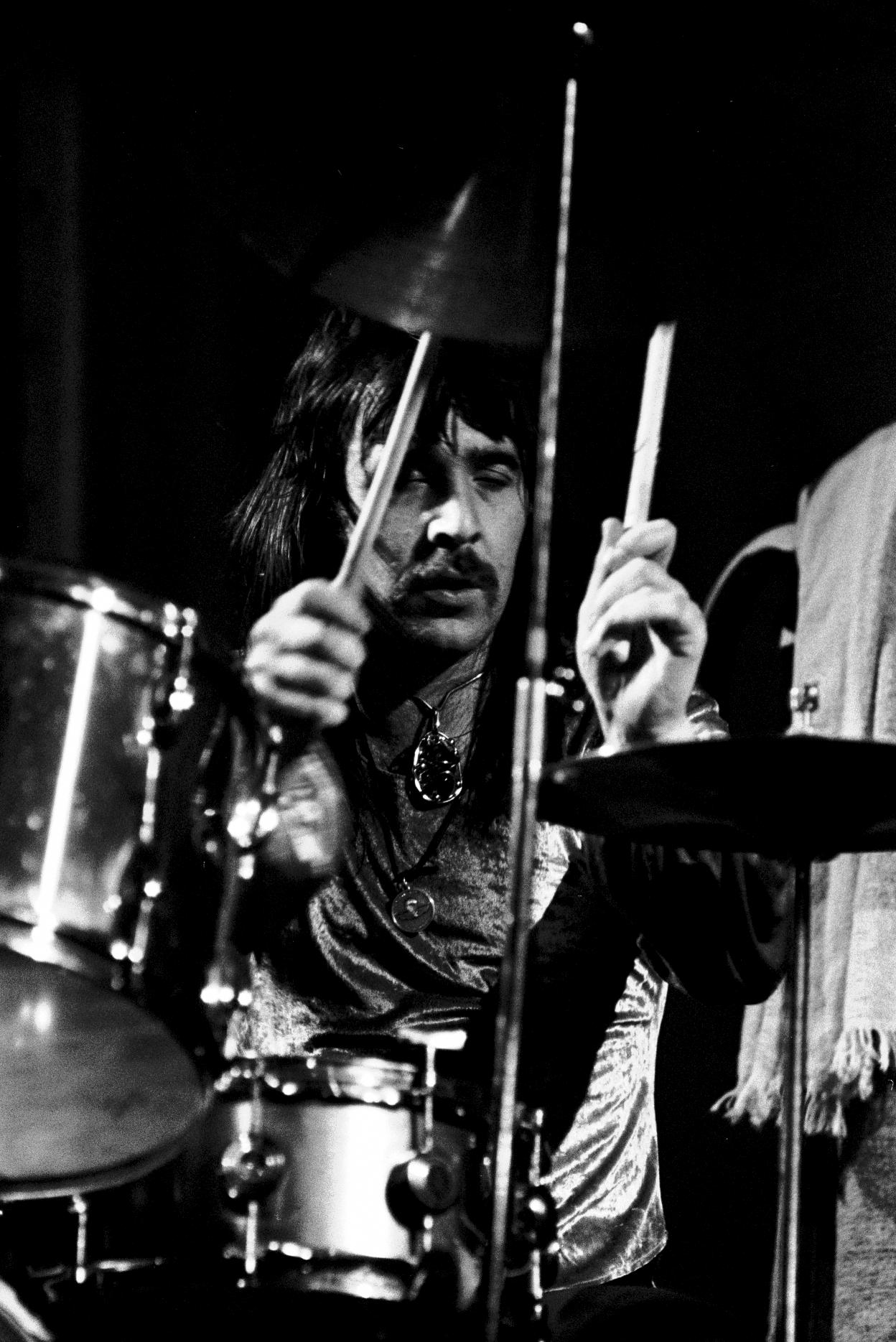 Uriah Heep in Hamburg, February 1973. Hier: Drummer Lee Kerslake Für Fehlerhinweise bin ich dankbar.